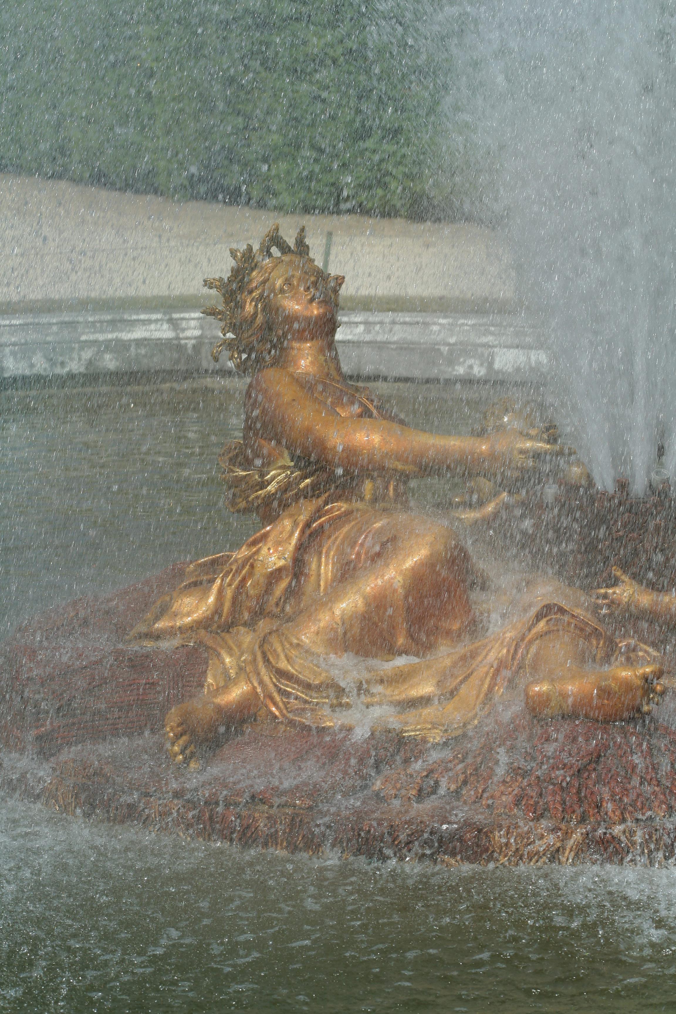 Parc de Versailles, bassin de Cérès. L'île de l'été, au centre d'un bassin octogonal, jonchée de gerbes de moisson, Cérès et trois amours. Thomas Regnaudin (1672-1679), plomb doré. Numéro d'inventaire : inv1850n°9586